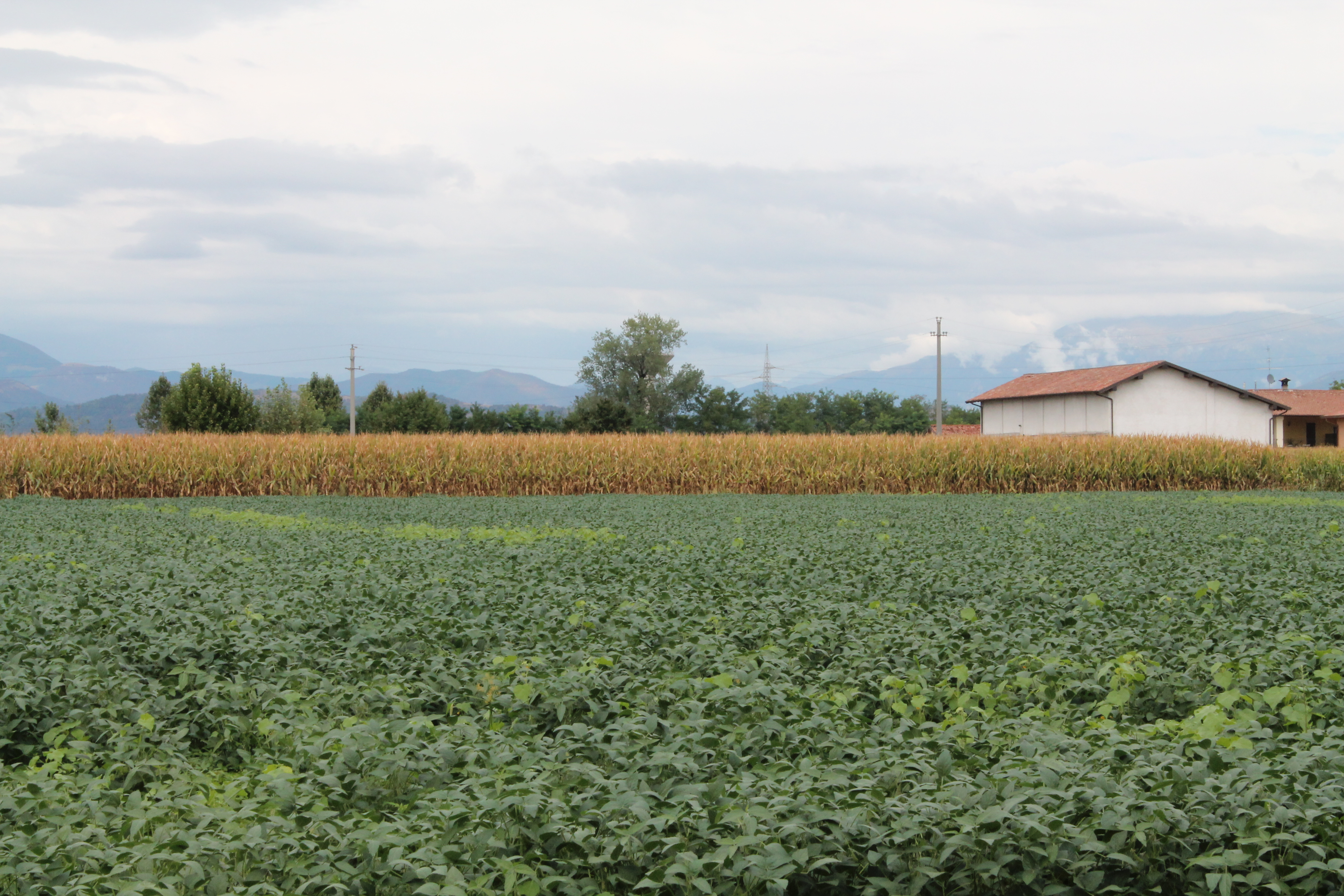 Coltivazione di mais nella campagna castelcovatese.